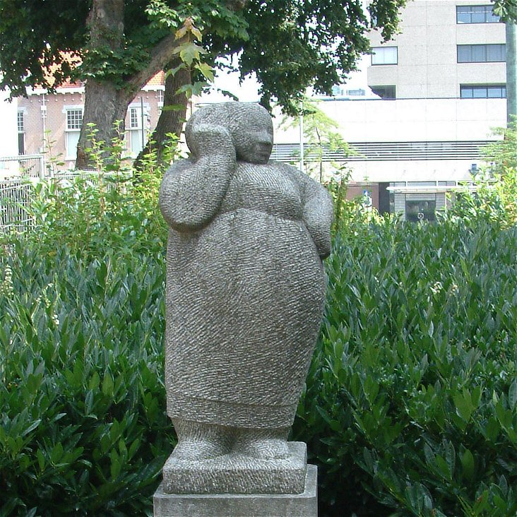 Kunstwerk: "Ons Moeder". Staat op de hoek Bergstraat/Kleine Berg in Eindhoven. 1989. Kunstenares: Antoinette Briet.